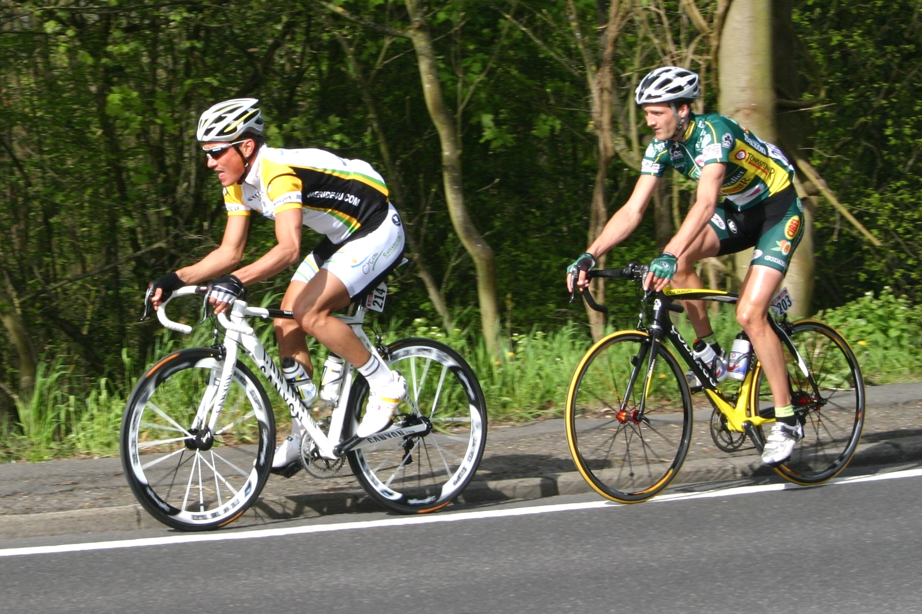 Liège-Bastogne-Liège 2008. Éischt Echappée an der Côte d'Embourg. Vir den David Kopp, hannen de Sébastien Delfosse.